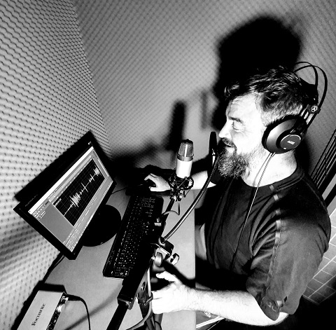 Anrich Herbst besig met "voice overs" in sy tuis ateljee in Boston, Kaapstad 2020.